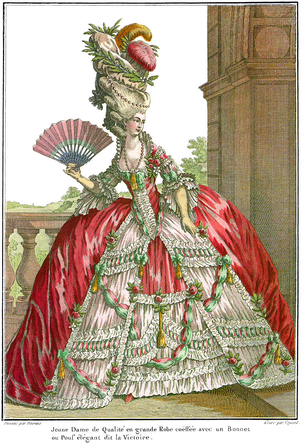 1778 fashion plate of French court dress with wide panniers and artificially enhanced "big hair". Plate 43 in Galerie des Modes for 1778. Caption: "Jeune Dame de Qualité en grande Robe coëffée avec un Bonnet ou Pouf élégant dit la Victoire. Dessiné par Desrais. Gravé par Voysant."